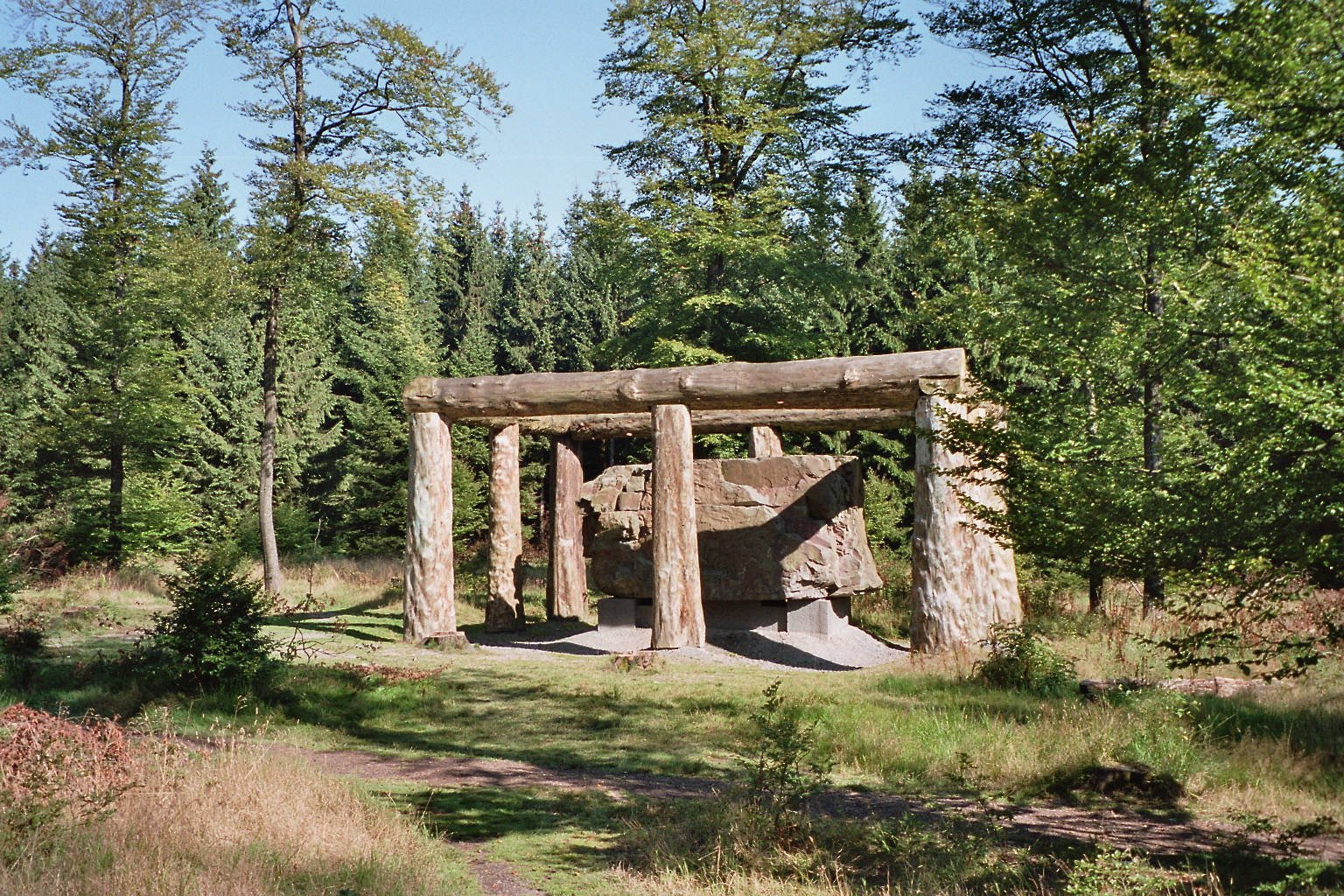 Sculpture "Stein-Zeit-Mensch" by Nils-Udo at the Waldskulpturenweg in the "Rothaargebirge"near Schmallenberg, Germany